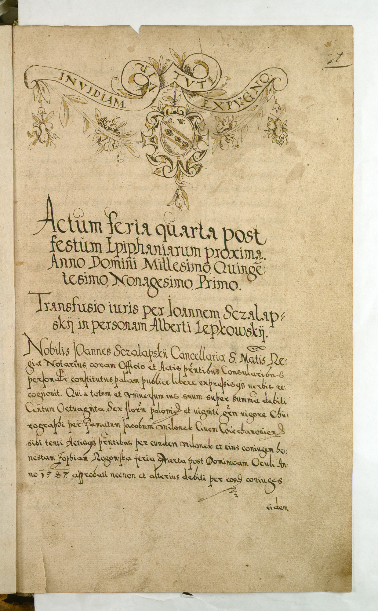 Pierwsza strona księgi rady miejskiej Starej Warszawy („Acta consularia civitatis antiquae varsoviensis”) z lat 1591 – 1600 r.